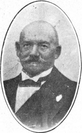 "Don Antonio Cambiaso Fundador de la Casa Cambiaso Hnos."